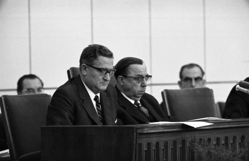 Plenarsitzung im Bundesrat. Sprecher BM Gradl (vorne rechts: Min. Präs. Altmeier)